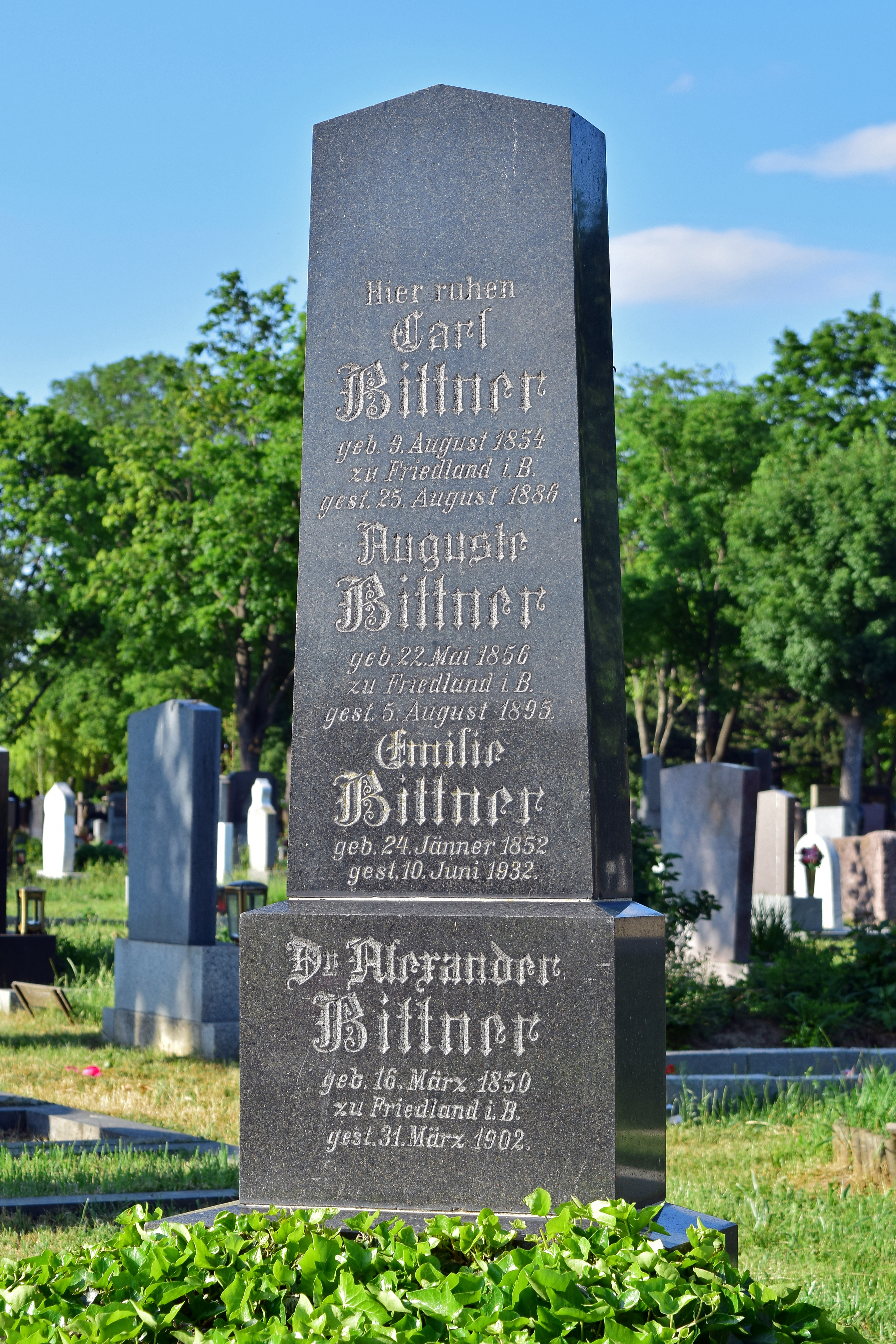 Ehrenhalber gewidmetes Grab von Alexander Bittner auf dem Wiener Zentralfriedhof.